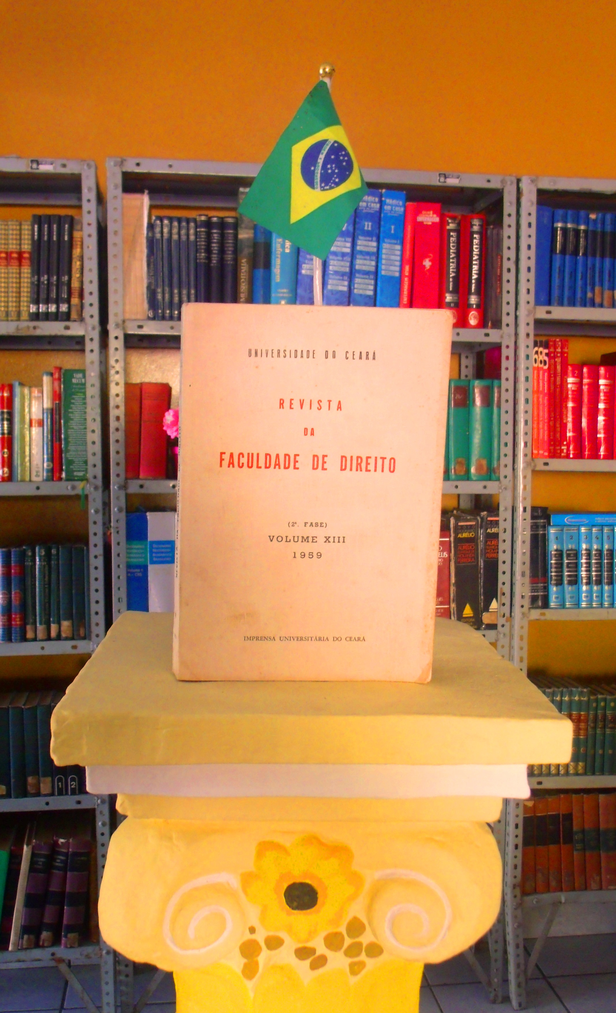 Exposição em biblioteca pública com a edição de 1959 da Revista Acadêmica da Faculdade de Direito da Universidade do Ceará